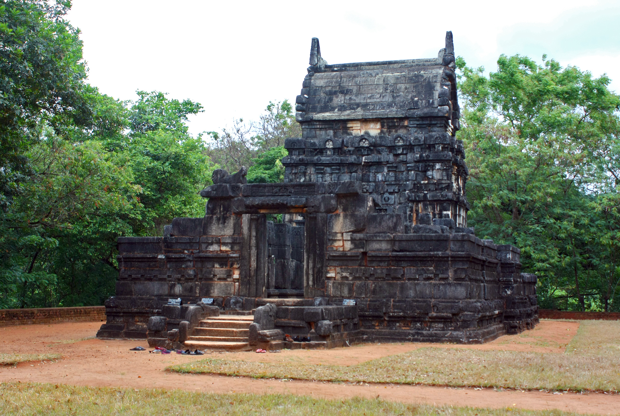 நாலந்த சிலை மண்டபம்